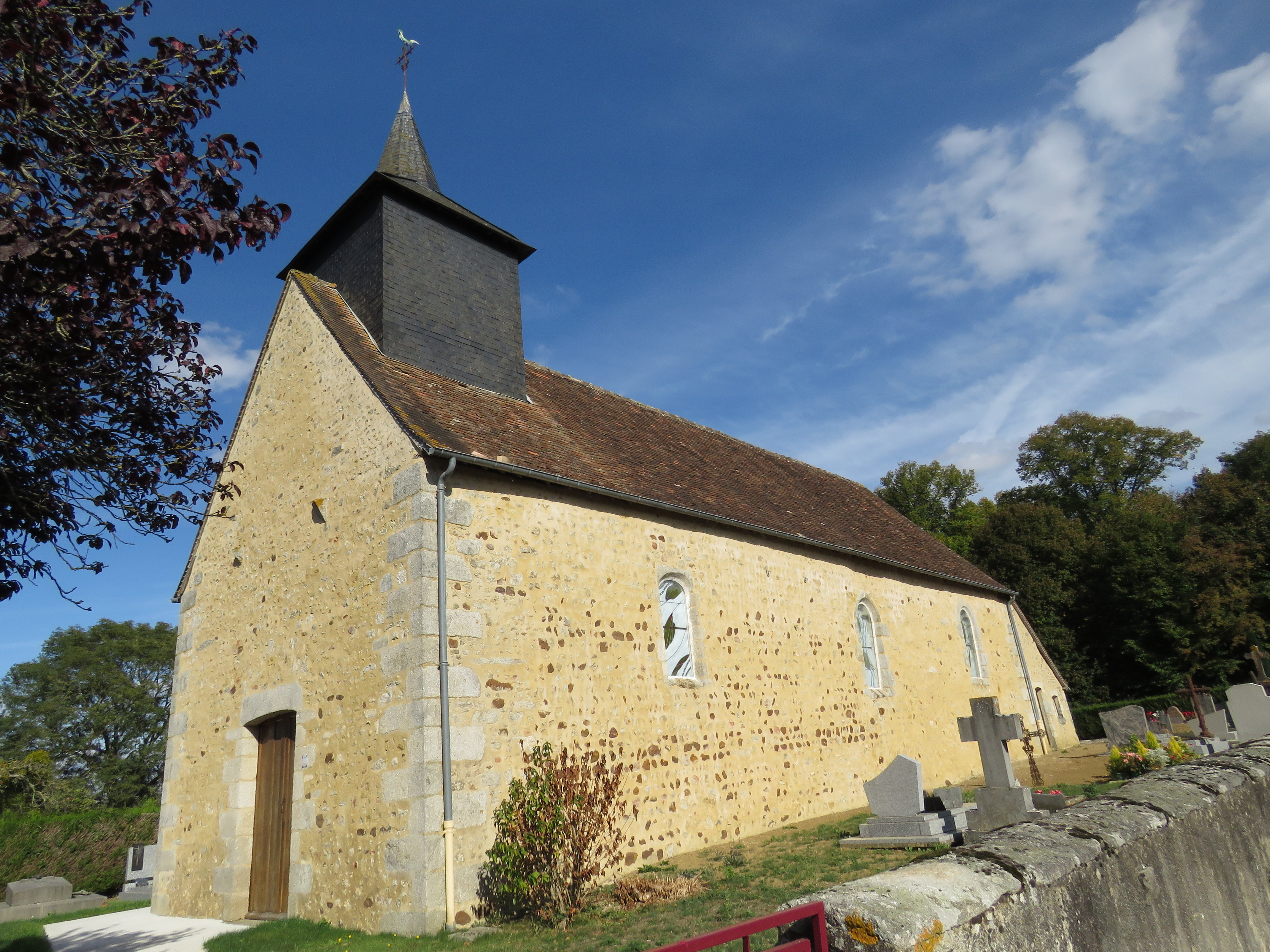 Eglise